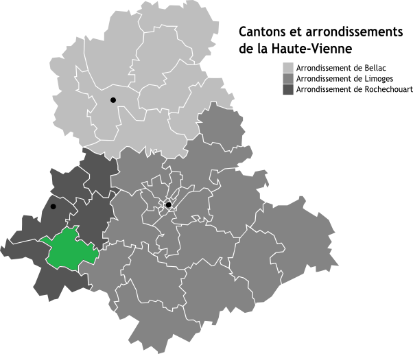 Canton d'Oradour-sur-Vayres, Limousin, France en Carte des arrondissements de la Haute-Vienne